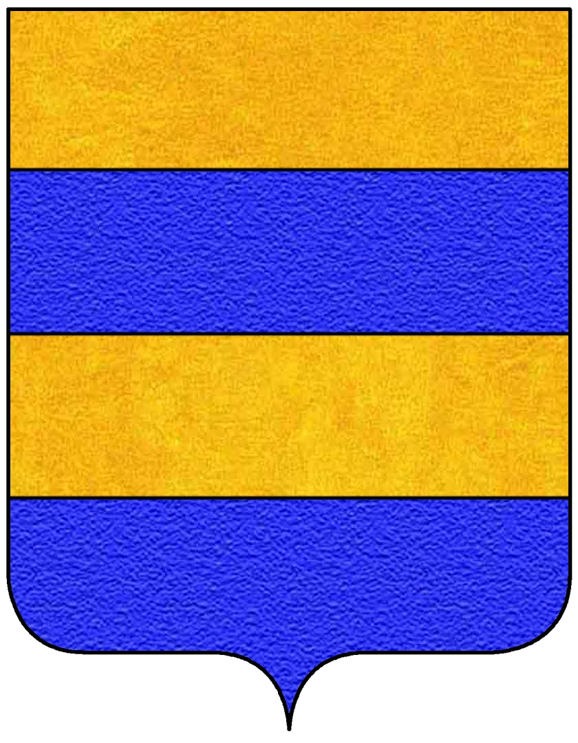 Stemma della famiglia Bellisomi